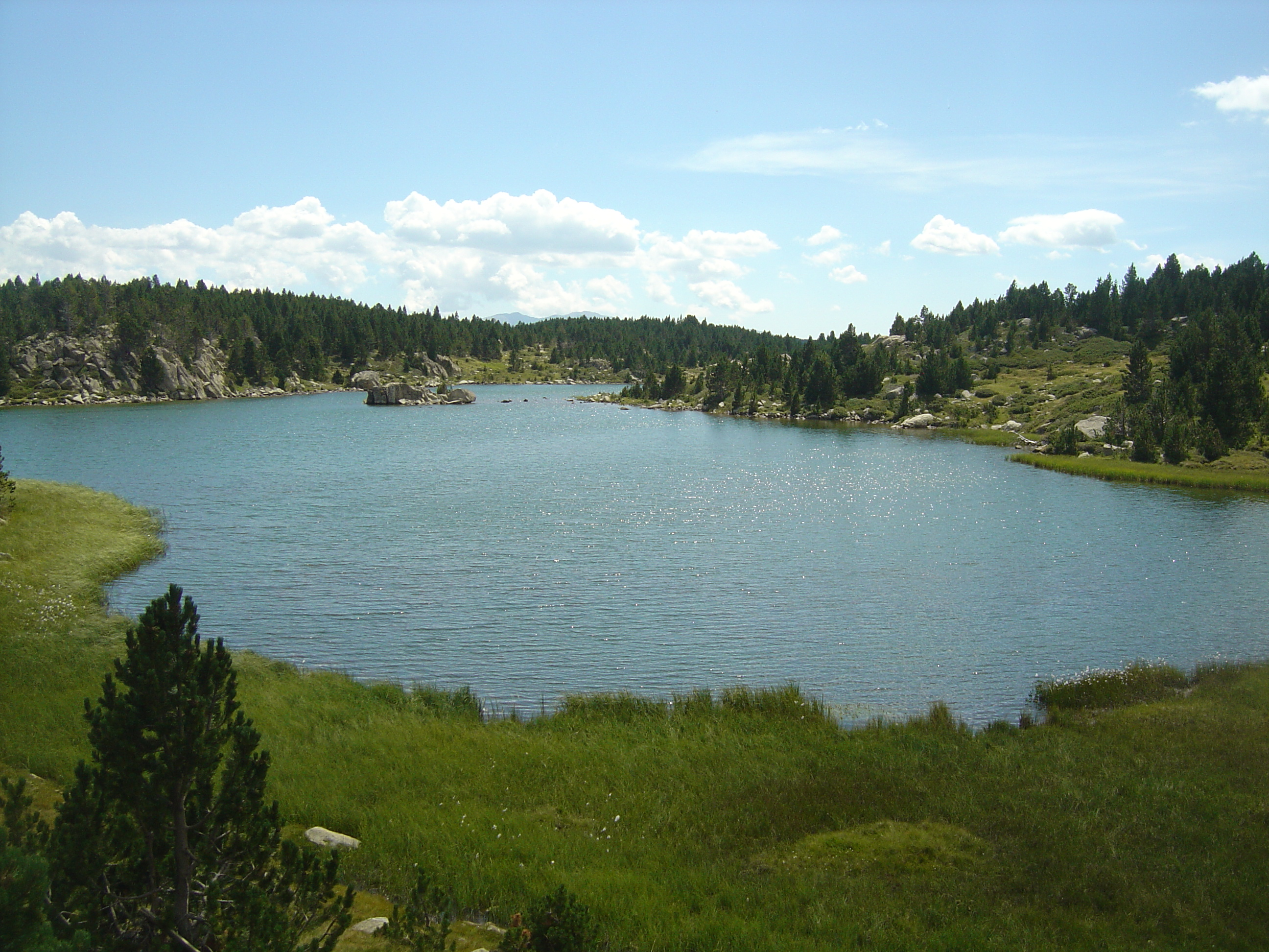 Estany Sec (2160m)